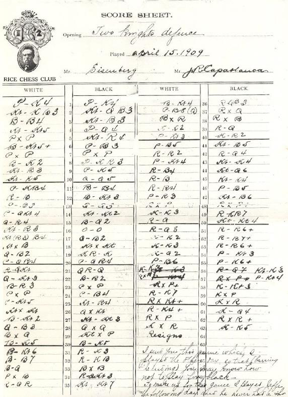 Capablanca and Eisengerg's score sheet (uma planilha de notação de Capablanca e Eisenberg).